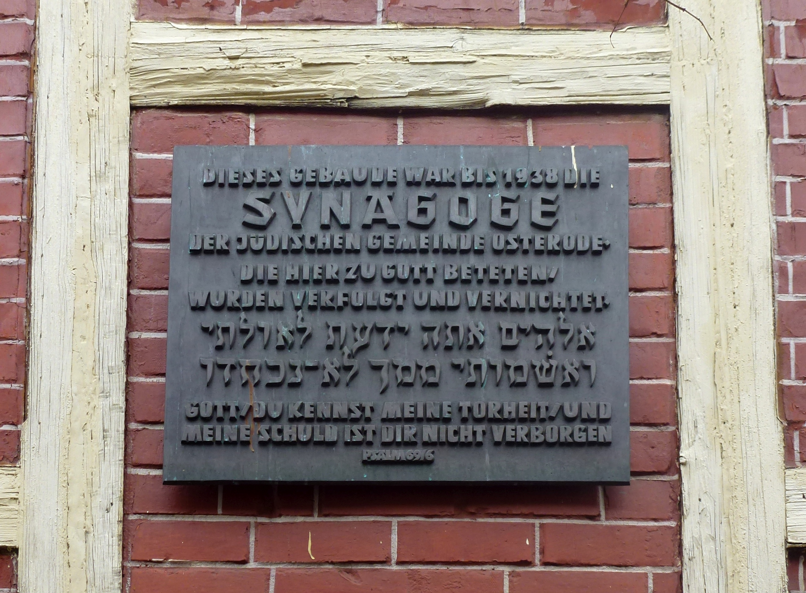 Plakette am Vorderhaus der ehemaligen Synagoge